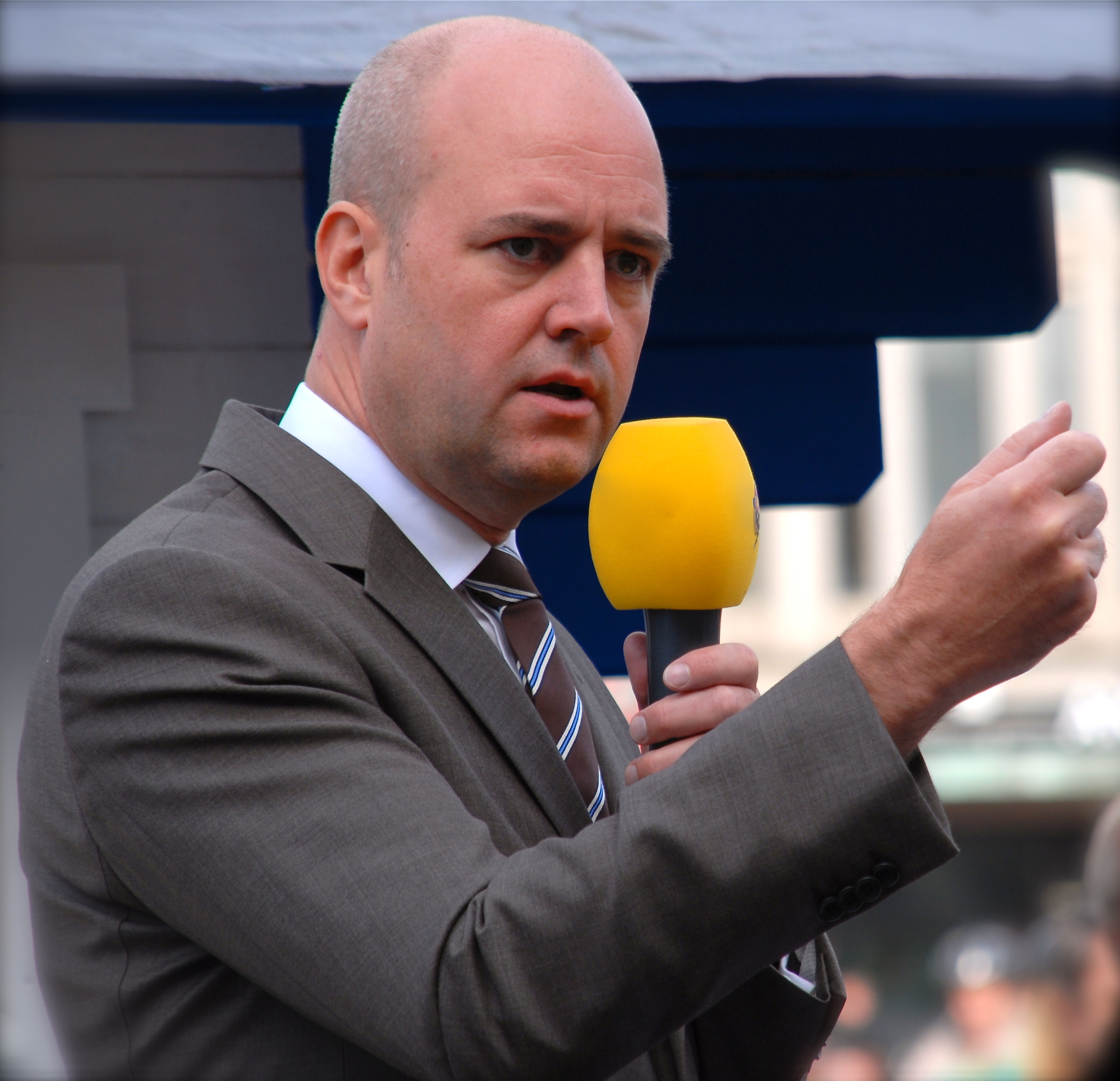 Statsminister Fredrik Reinfeldt, på Sergels torg i Stockholm, i valrörelsen 2010.